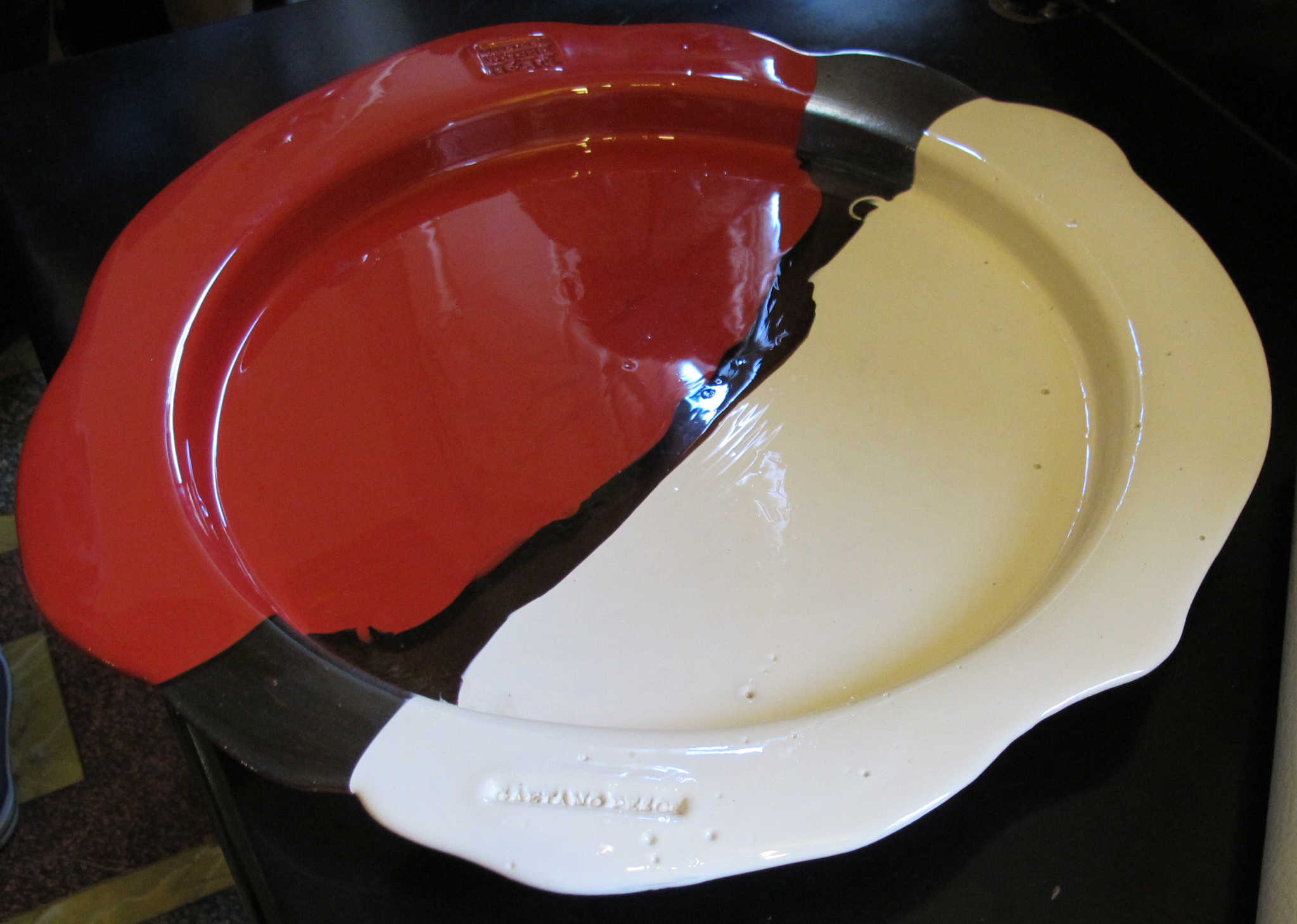 Gaetano pesce, vassoio in resina